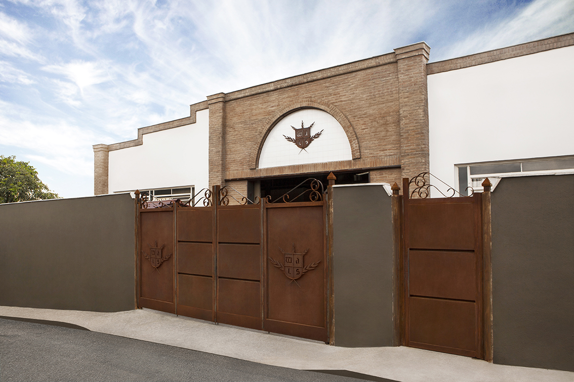 Fachada da Cervejaria Wäls, em Belo Horizonte, Minas Gerais, Brasil.